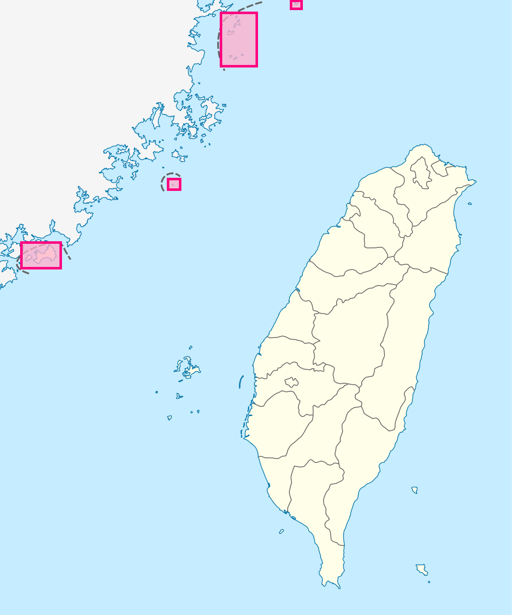 金馬地區地圖。